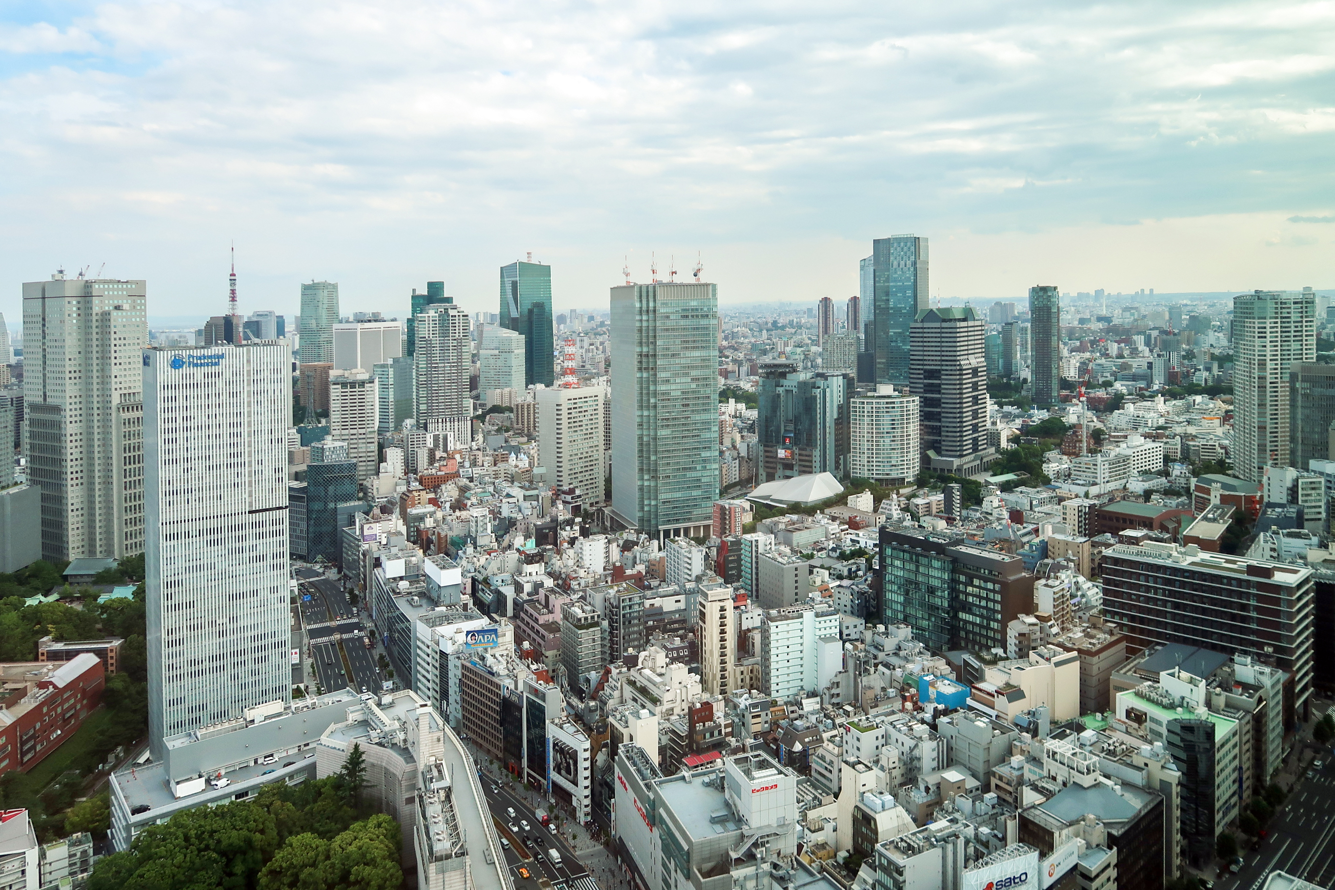 Akasaka, Tokyo